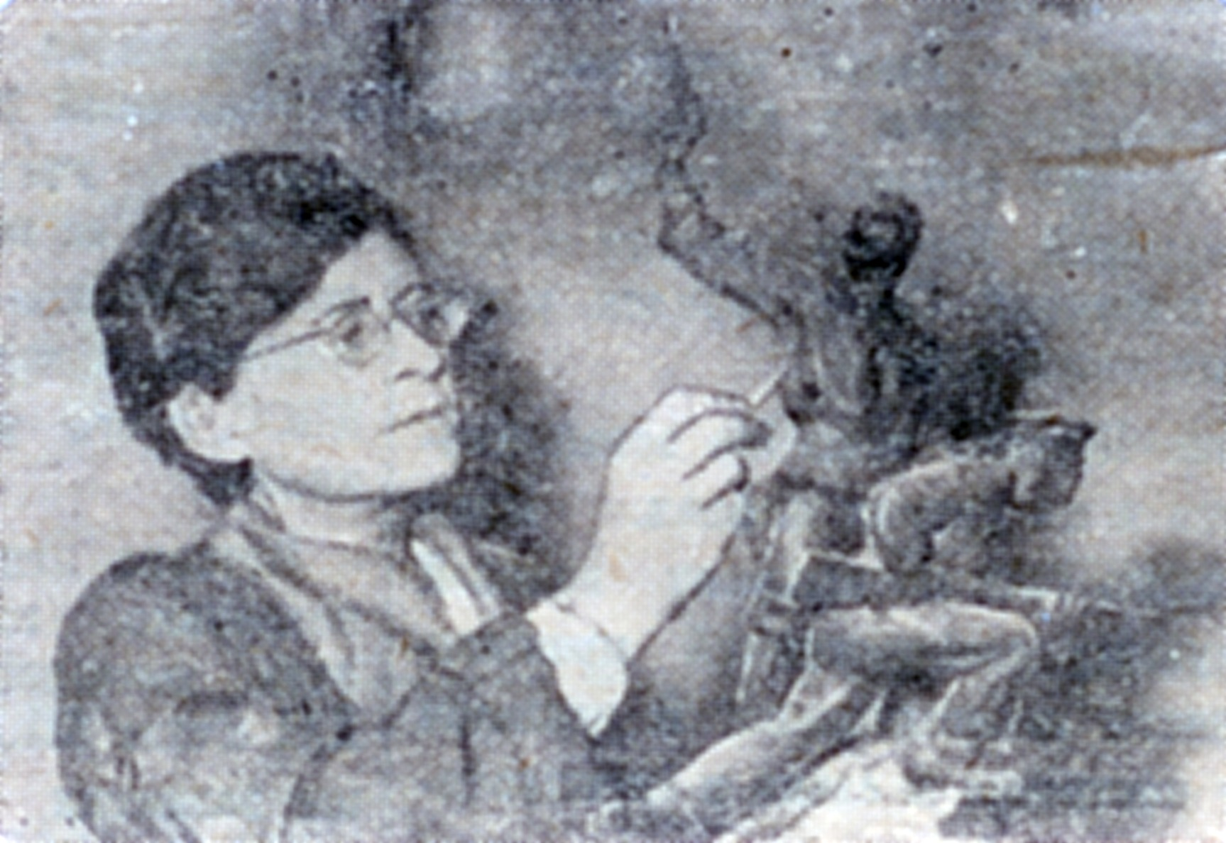 Скульптор Валентина Руссо за работой, Таганрог, 1959 г.